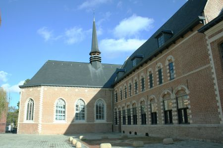 Hospice d'Havré fondé en 1260 à Tourcoing, bâtiments du XVIIe siècle.